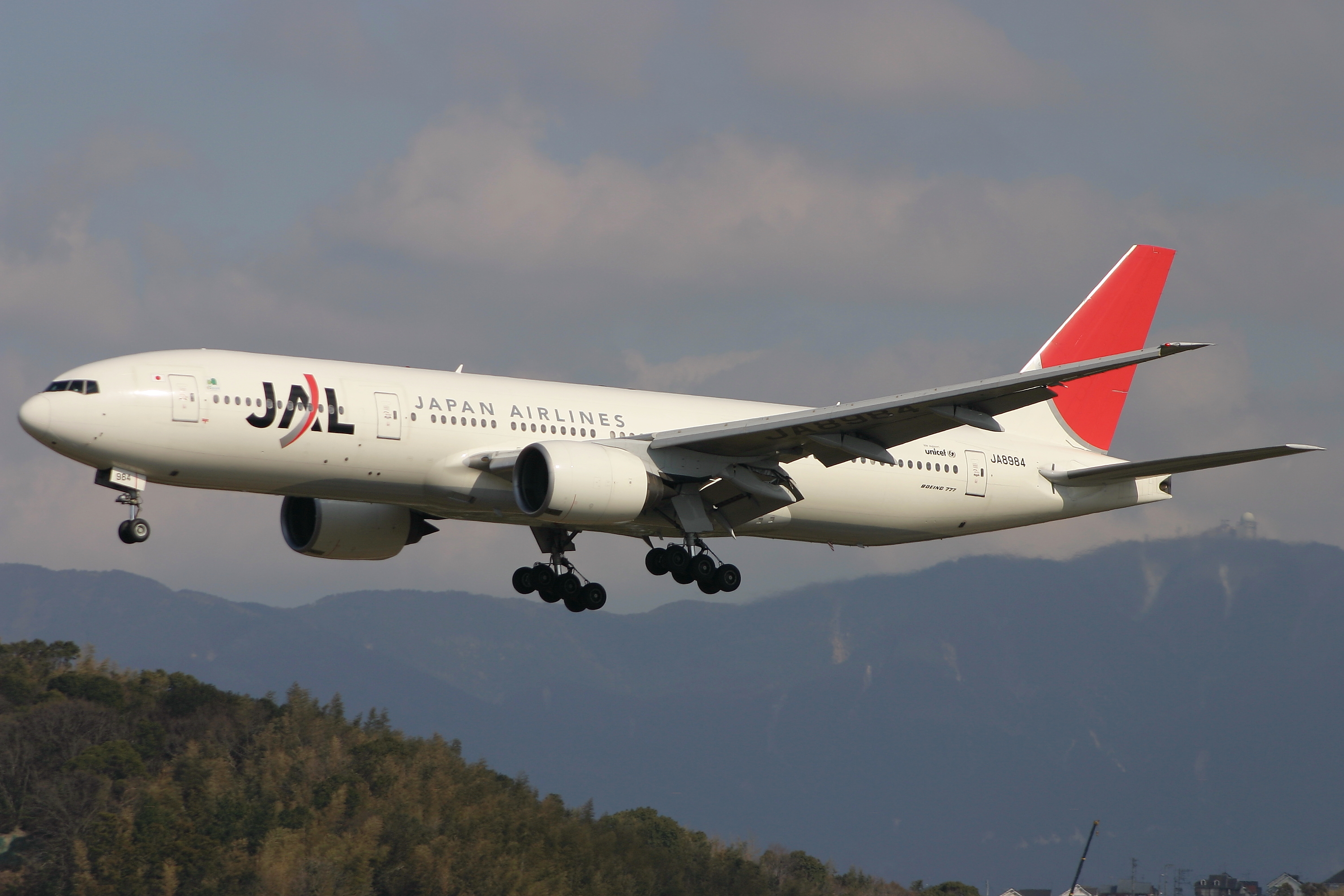 日本航空 ボーイング 777-200 福岡空港